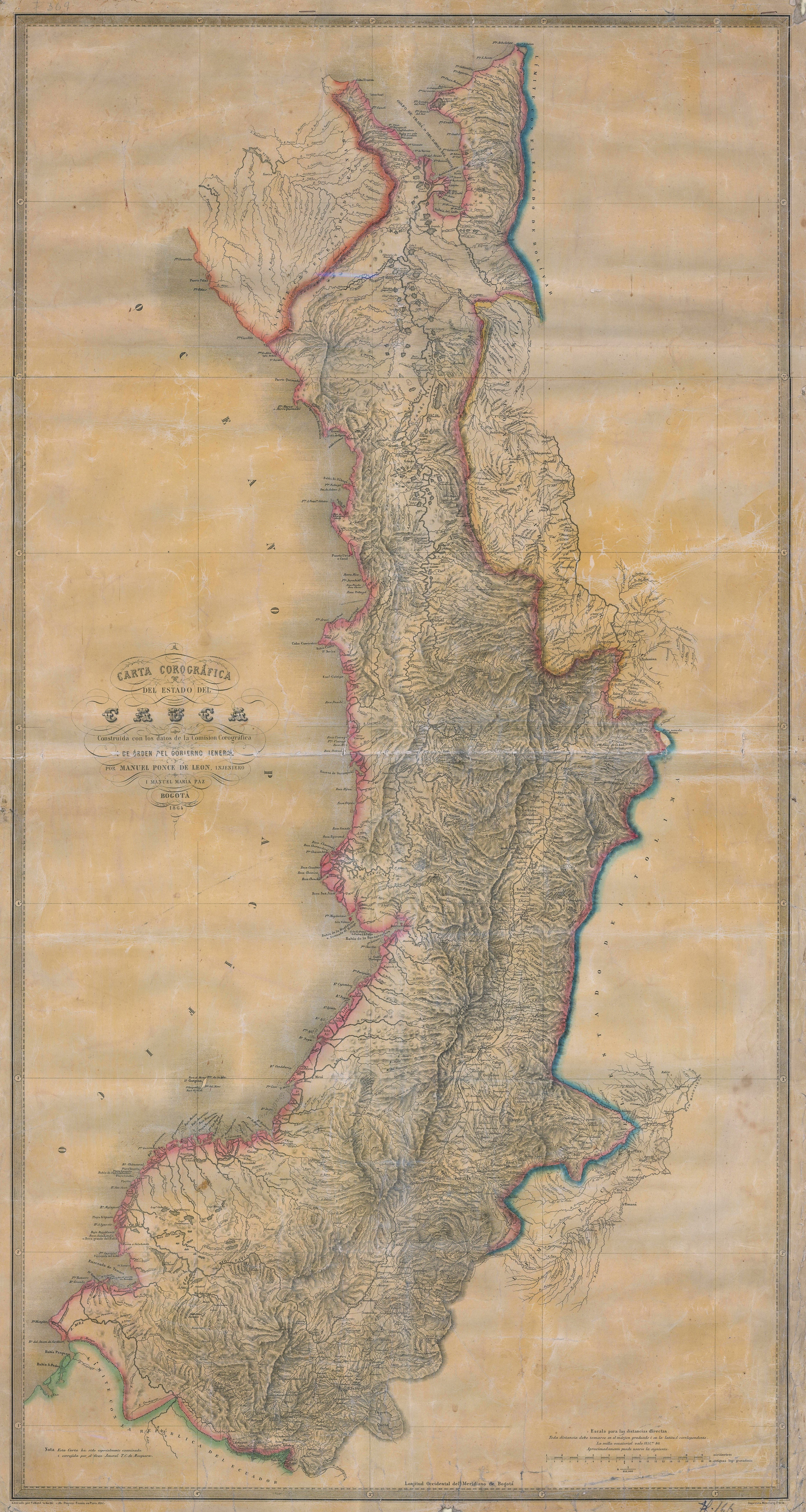 Carta Corográfica del Estado Soberano del Cauca. Tomado del "Atlas de los Estados Unidos de Colombia, antigua Nueva Granada", 1865.